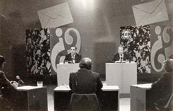 Debate televisado entre los candidatos a gobernador de Córdoba: Ricardo Obregón Cano (Partido Justicialista) y Víctor Martínez (Unión Cívica Radical), abril de 1973.